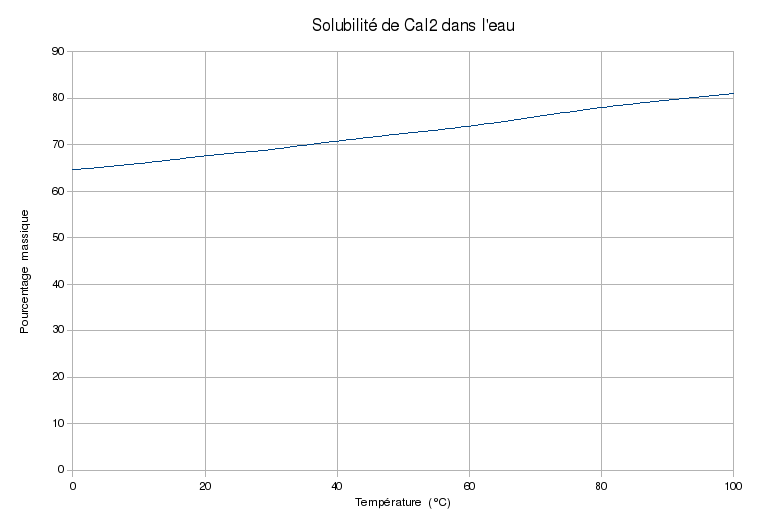 Solubilité de l'iodure de calcium dans l'eau